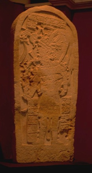 Stela Maya Foto 2004, Museo nacional de Arquelogia, Guatemala